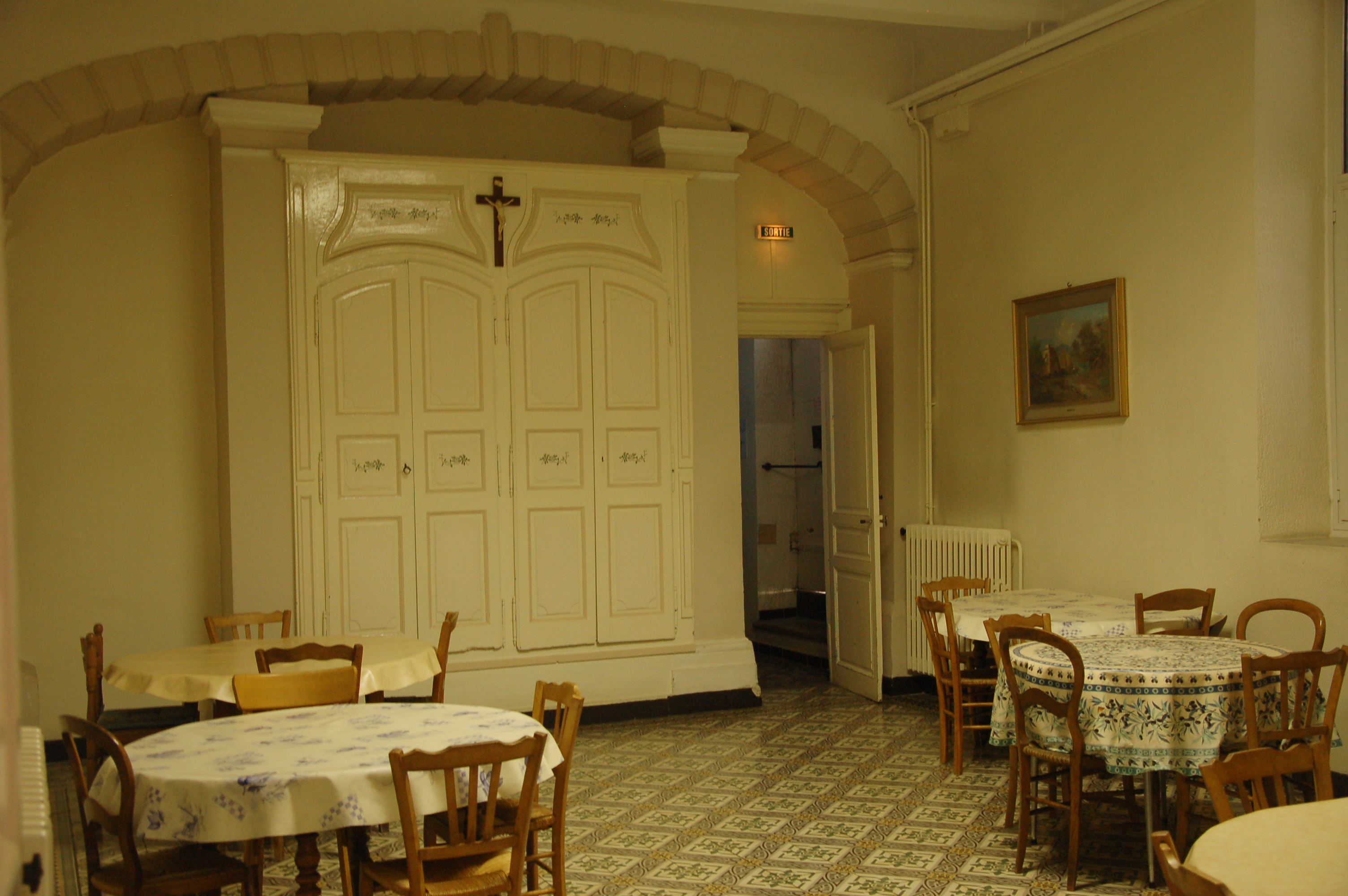 Les sœurs de Notre-Dame de la Compassion sont une congrégation religieuse catholique créée par le Père Barthès à Marseille au XIXème siècle.Leur maison mère se trouve dans le XIIème arrondissement de Marseille, dans l'Allée de la Compassion, autrefois le domaine de la famille Blancard.